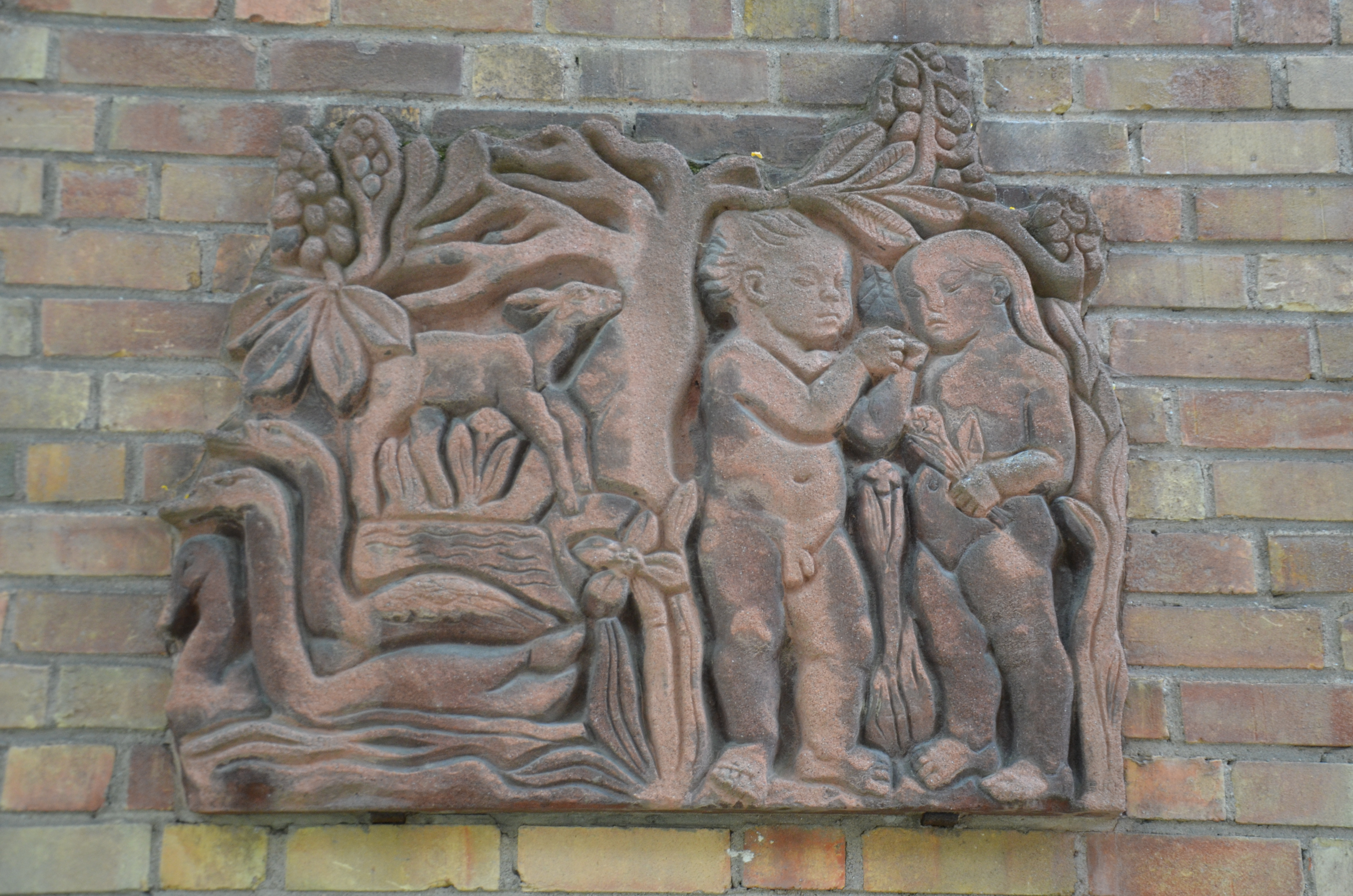 Nyckelpigan av Puck Stocklassa, concrete, Boktryckarvägen i Hägerstensåsen i Stockholm